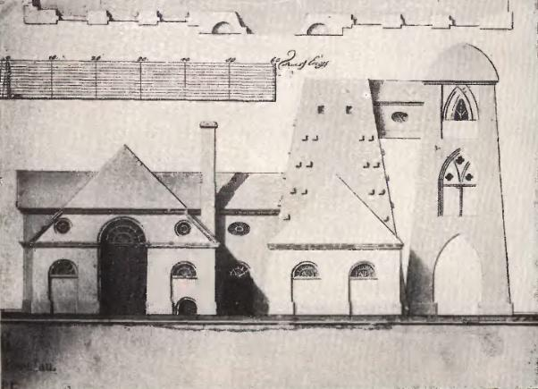 Königliche Eisengießerei in Gleiwitz Gießhütte, Ofen, Gießturm